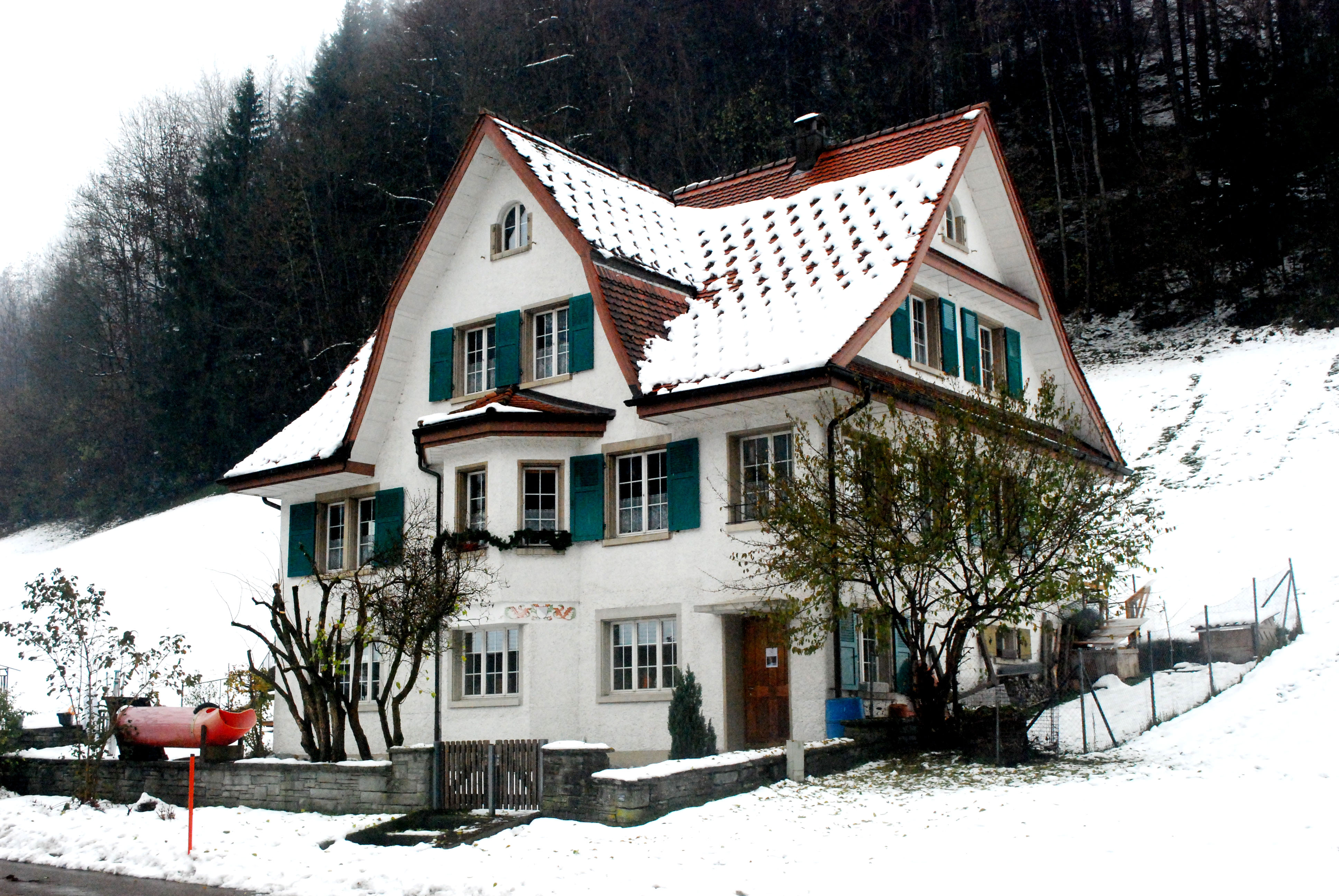 Das Ortsmuseum „Alte Kanzlei“ befindet sich an der Tösstalstrasse 186.